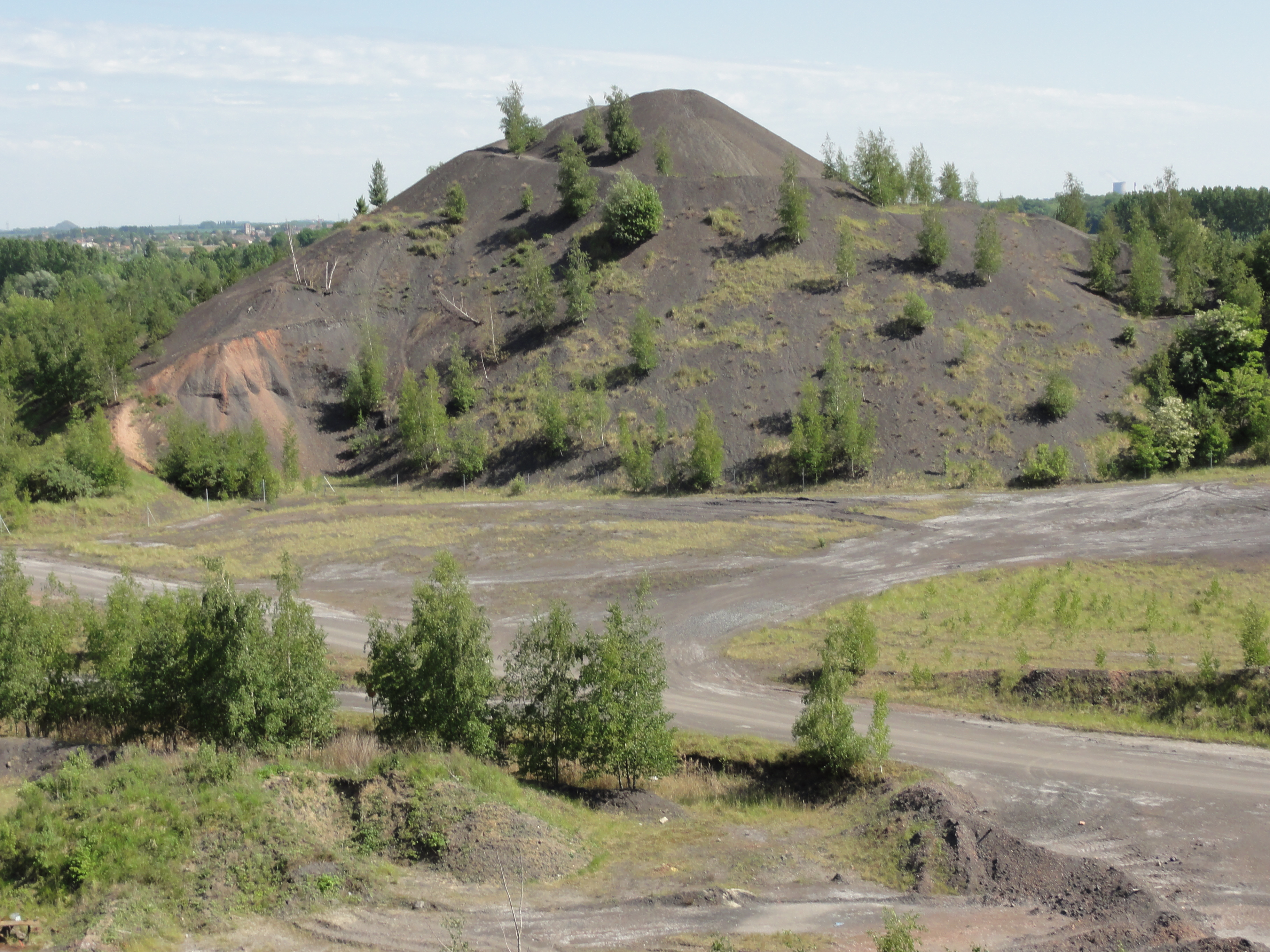 Terril no 144 dit Rieulay, fosses De Sessevalle et Lemay de la Compagnie des mines d'Aniche dans le bassin minier du Nord-Pas-de-Calais, Rieulay et Pecquencourt, Nord, Nord-Pas-de-Calais, France. Le terril no 144 en majeure partie, ainsi que son lac, sont inscrits sur la liste du patrimoine mondial de l'Unesco le 30 juin 2012 et y constituent le site no 27.